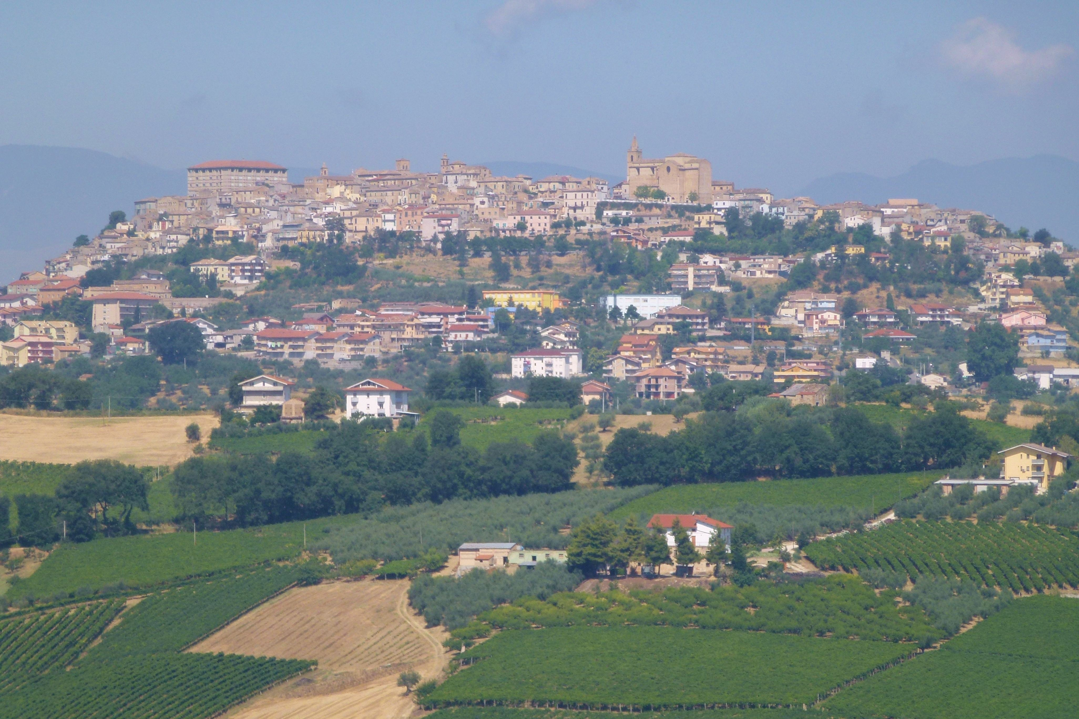 Bucchianico da Vacri